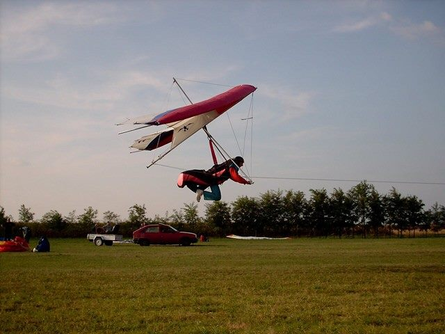 Српски (ћирилица): Безмоторно-змајарство обука